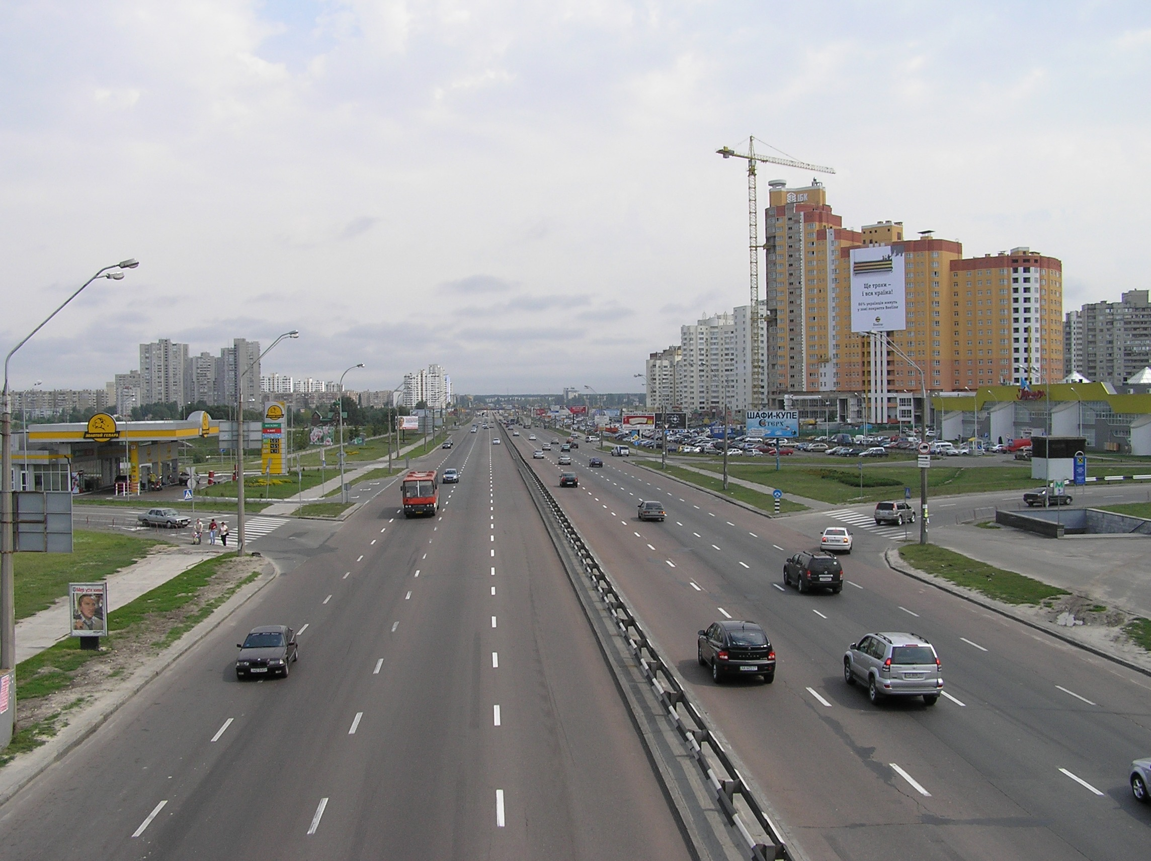 Київ. Проспект М. Бажана. Східний напрямок.